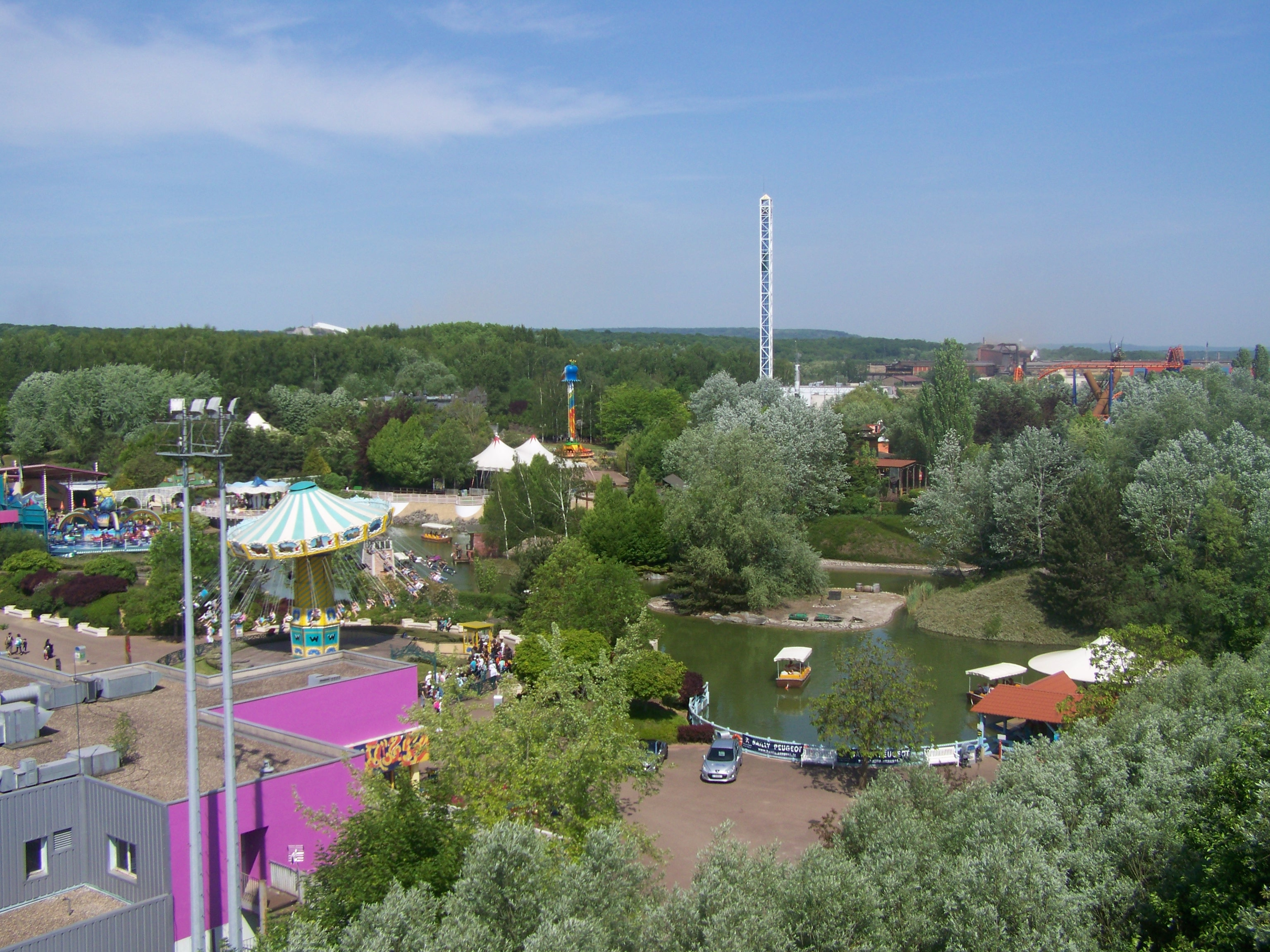 Vue de Walyygator Parc